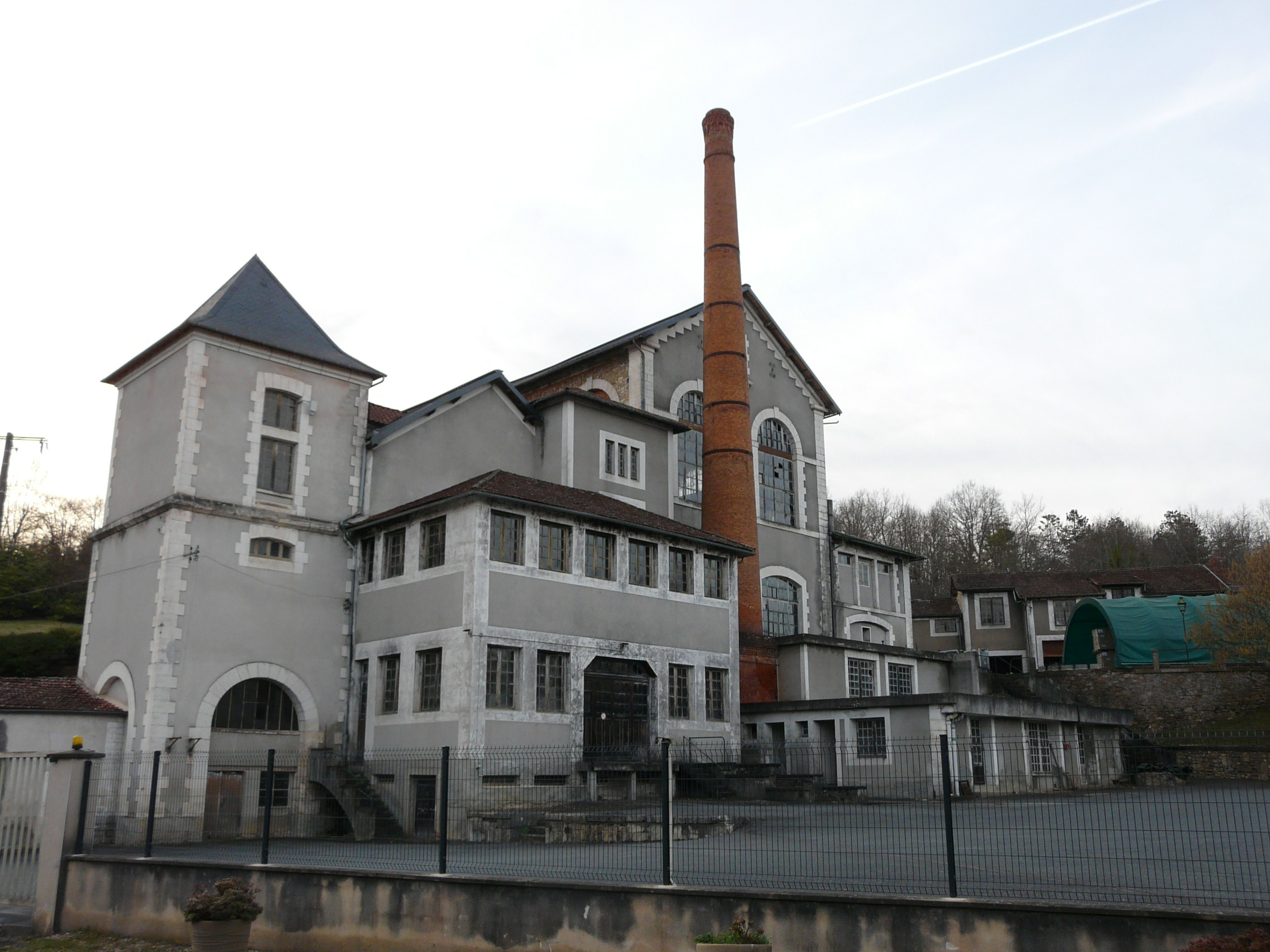 Le site de l'ancienne brasserie Gangloff, Saint-Martial-d'Albarède, Dordogne, France.